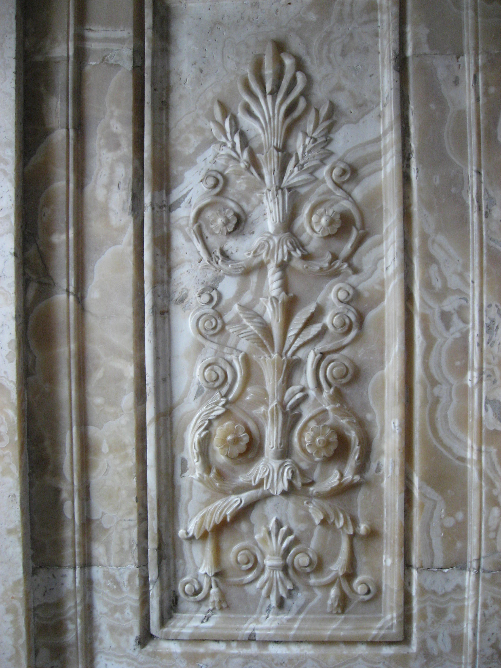 The Sultan's Hamam (Selamlık Hünkâr Hamamı) in Dolmabahçe Palace. (#14 on the tour.)